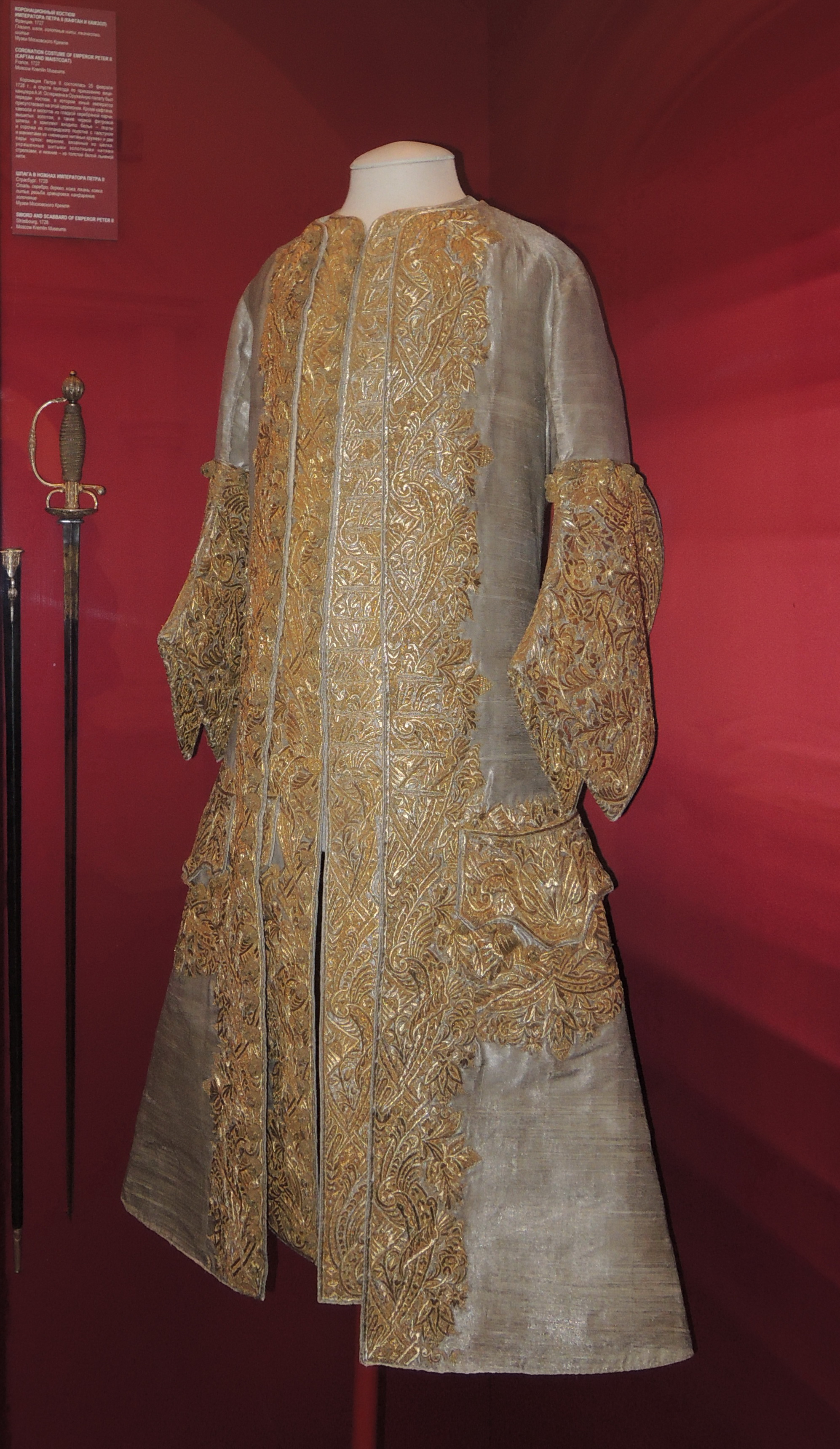 Коронационный костюм императора Петра II (кафтан и камзол). Франция, 1727. Глазет, шелк, золотные нити Самый ранний мужской коронационный костюм в кремлевских музеях и единственный светского образца.